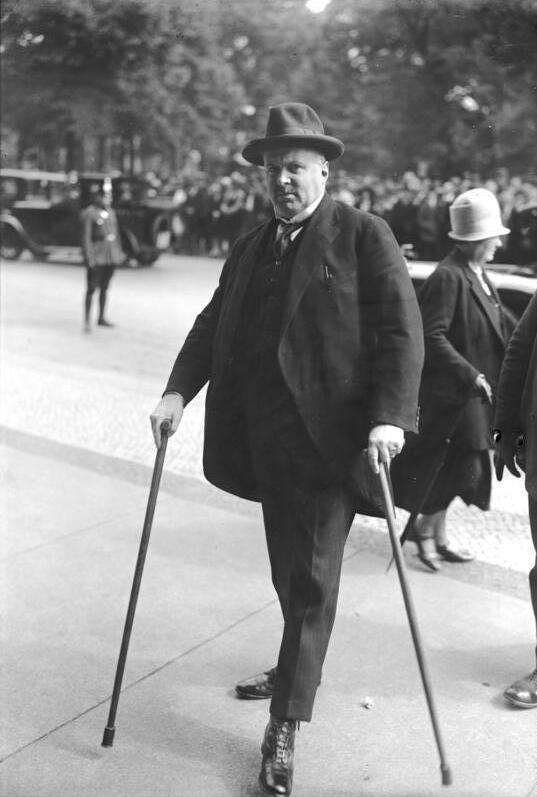 Interessante Politiker auf dem Wege zum neuen Reichstag! Der deutschnationale Abgeordnete Graf zu Stolberg-Werningerode begibt sich in den Reichstag.